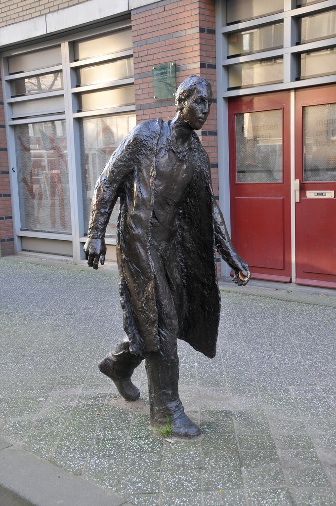 ‘Drie figuren op straat’ (2001) door kunstenaar Peter Erftemeijer (1956).